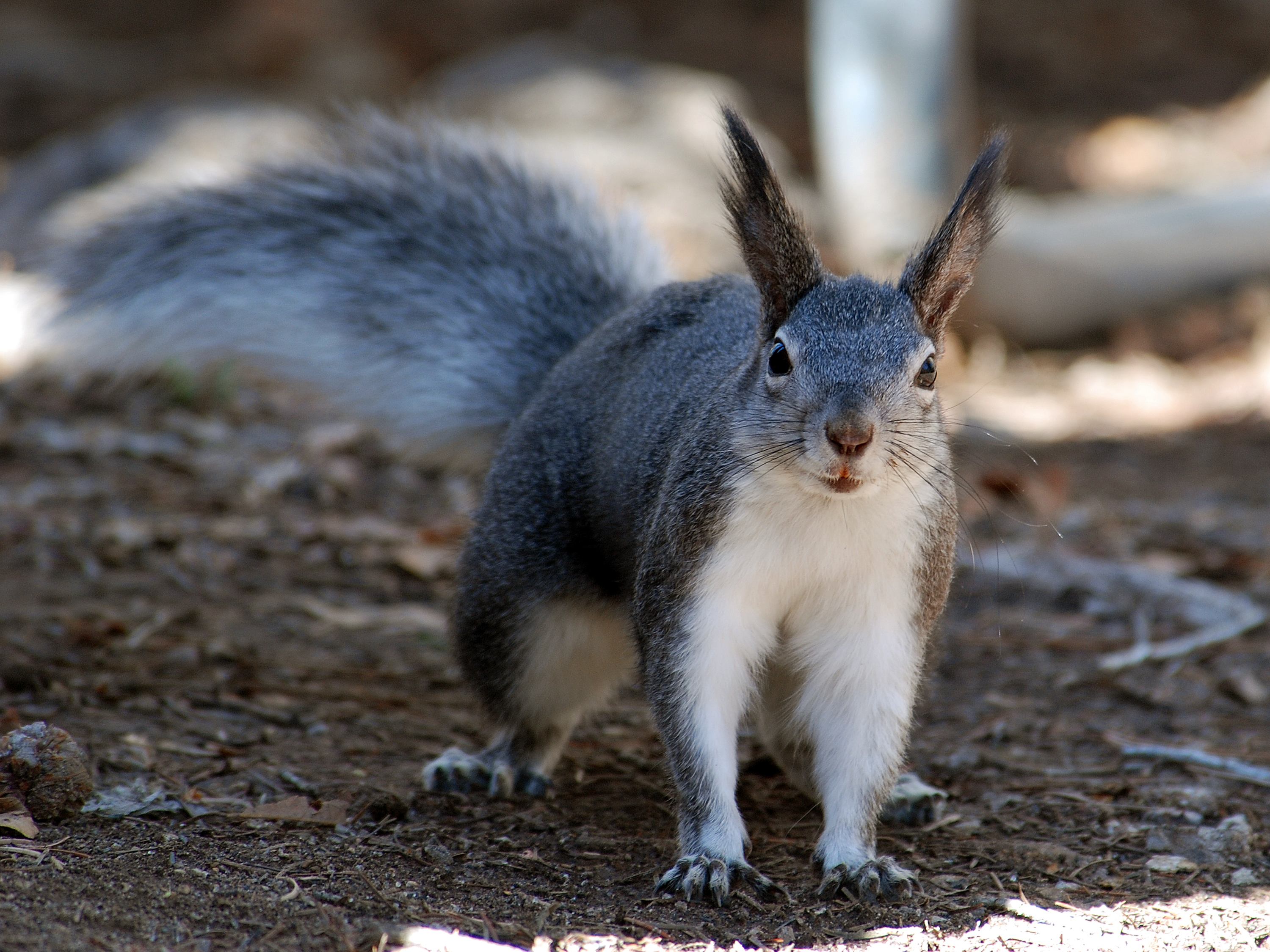 Abert's Squirrel (Sciurus aberti)